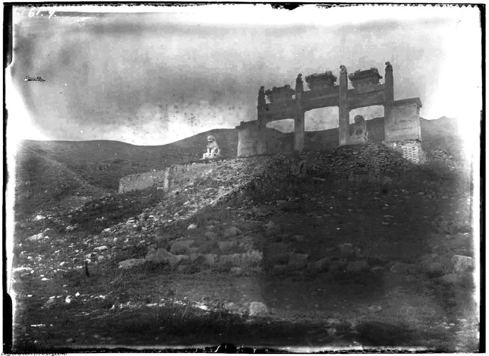 北京宝谛寺石牌坊